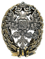 Знак для окончивших Императорский Санкт-Петербургский лесной институт (1899–1904)